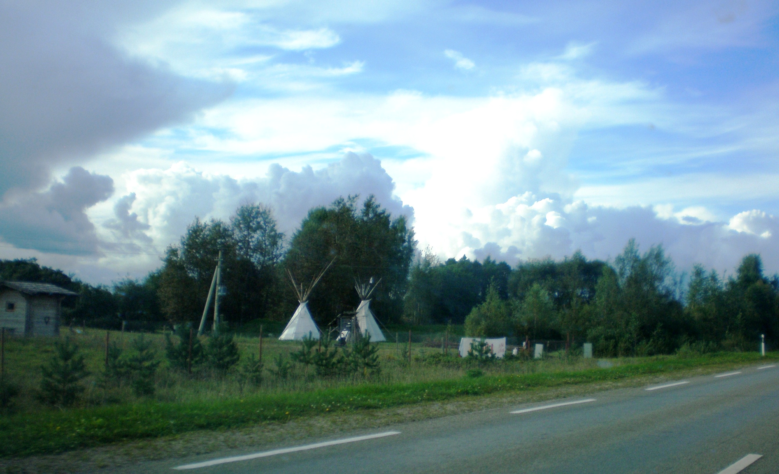 Indėniški vigvamai, Meškasalis, Alytaus raj.